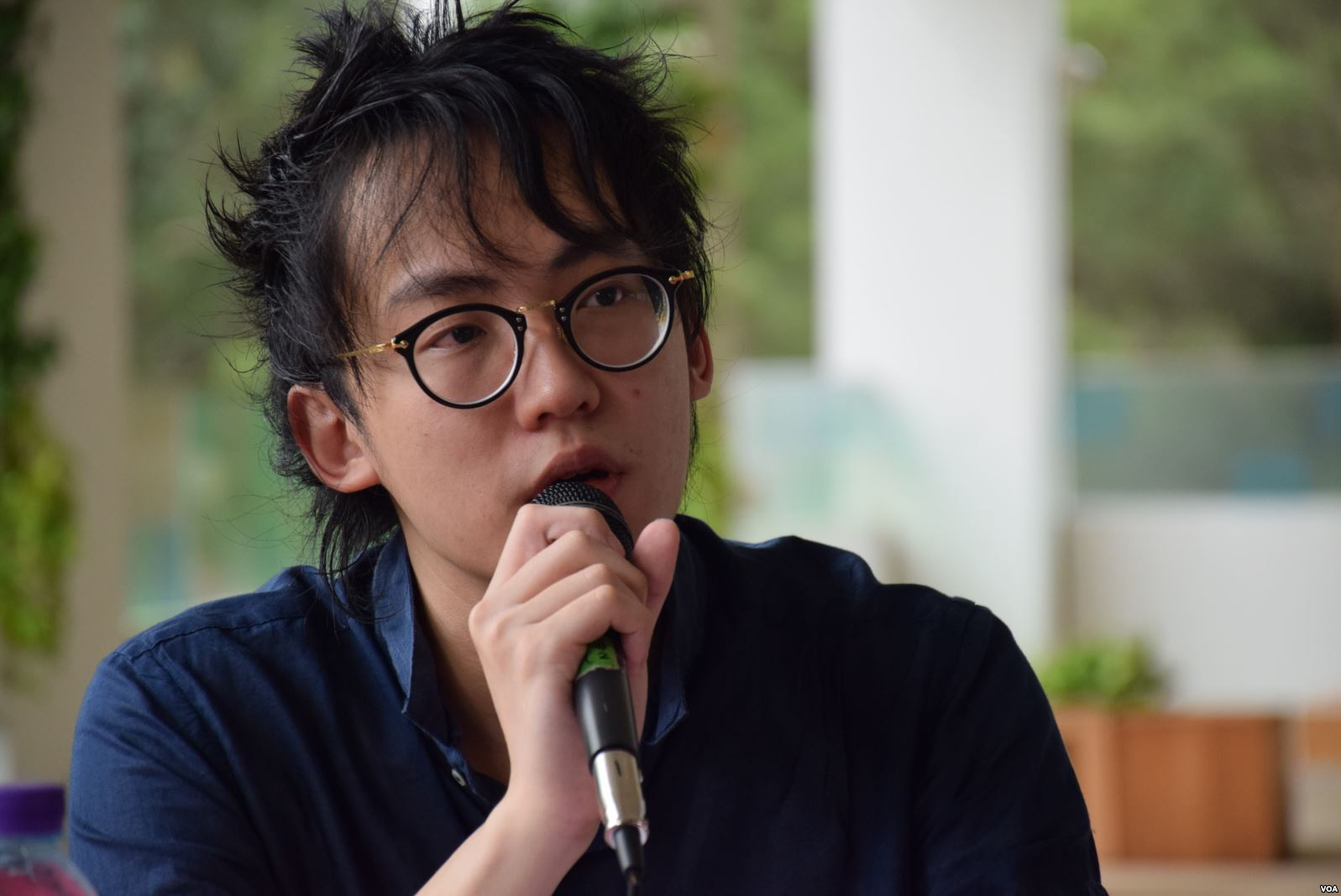 90後的香港作家盧斯達表示，港人悼念六四應該拋棄由支聯會主導。